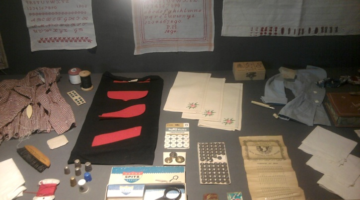 Zijn eerste verzamelde spulletjes